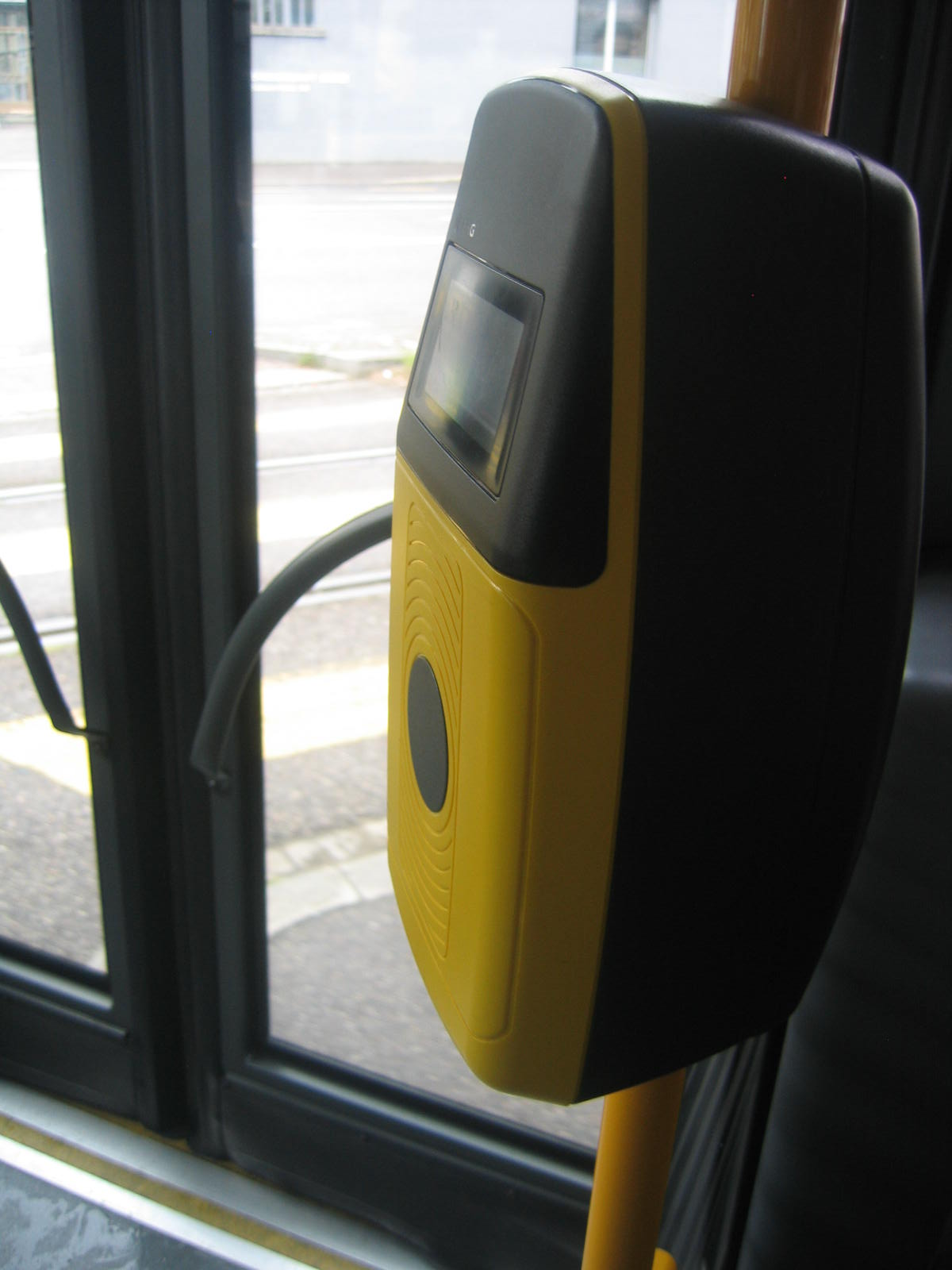 Le valideur des Mercedes-Benz Citaro II BHNS de Distribus.